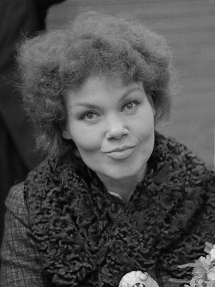 Cleo Laine op Schiphol 28 september 1962